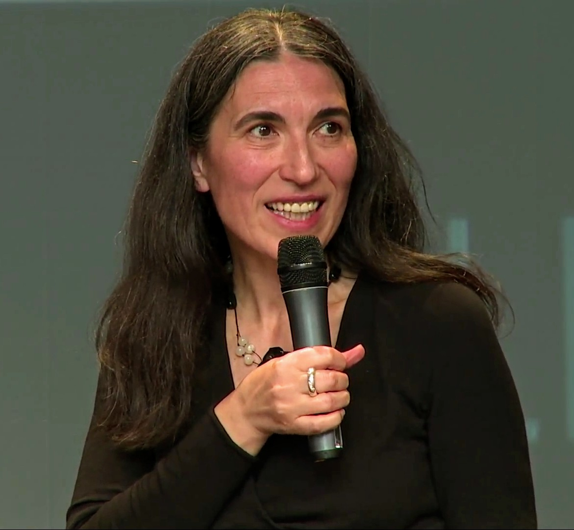 Find out more at: Wie müssen Rechtsstaaten ihre Nachrichtendienste organisieren damit sie Bürgerrechte und Sicherheit schützen können? Brauchen wir dazu mehr europäische Zusammenarbeit? Wenn ja, was wären die Standards für parlamentarische Aufsicht und gerichtliche Kontrolle? Markus Löning Satish Sule Selmin Çalışkan Creative Commons Attribution-ShareAlike 3.0 Germany (CC BY-SA 3.0 DE)